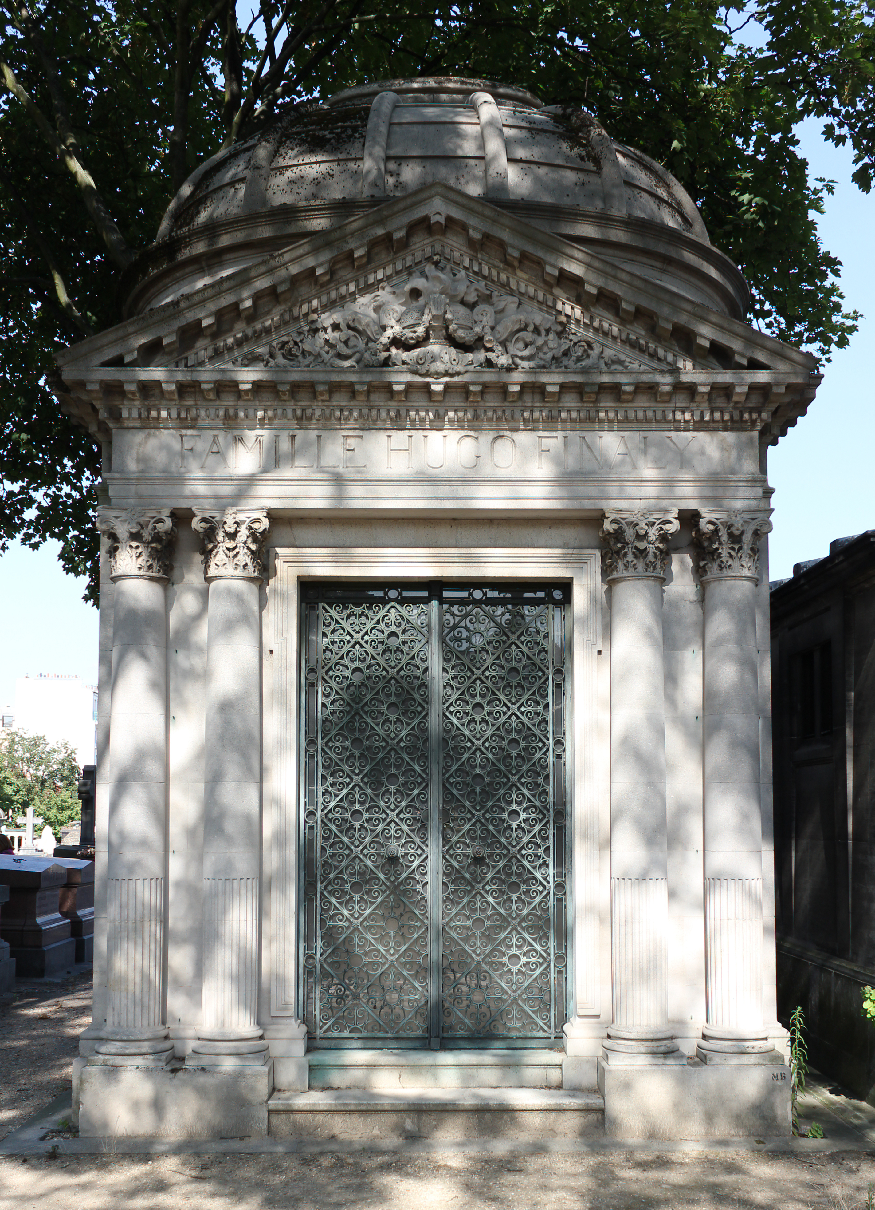 Sépulture probable des banquiers Hugo Finaly (1844-1915) et Horace Finaly (1871-1945). Chapelle surmontée d'un dôme. Le portique à colonnes corinthiennes est surmonté d'un fronton triangulaire dont le tympan est orné d'un bas-relief.